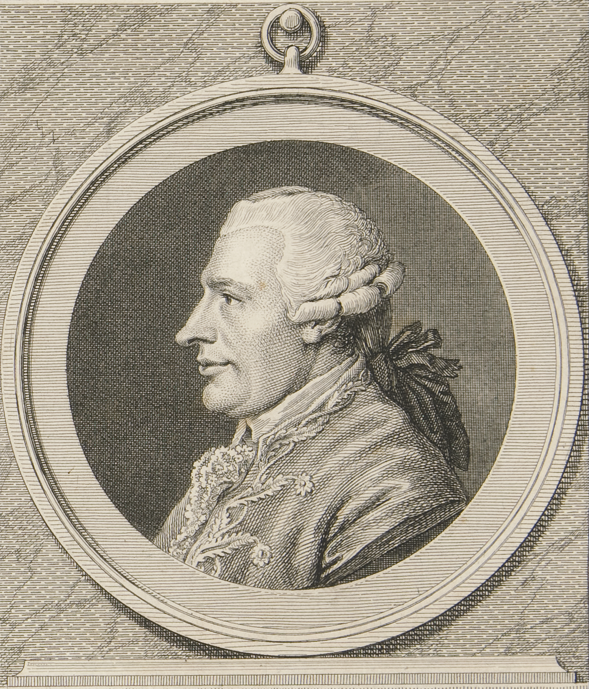 Gérard de Rayneval, from American Statesmen, set of 12